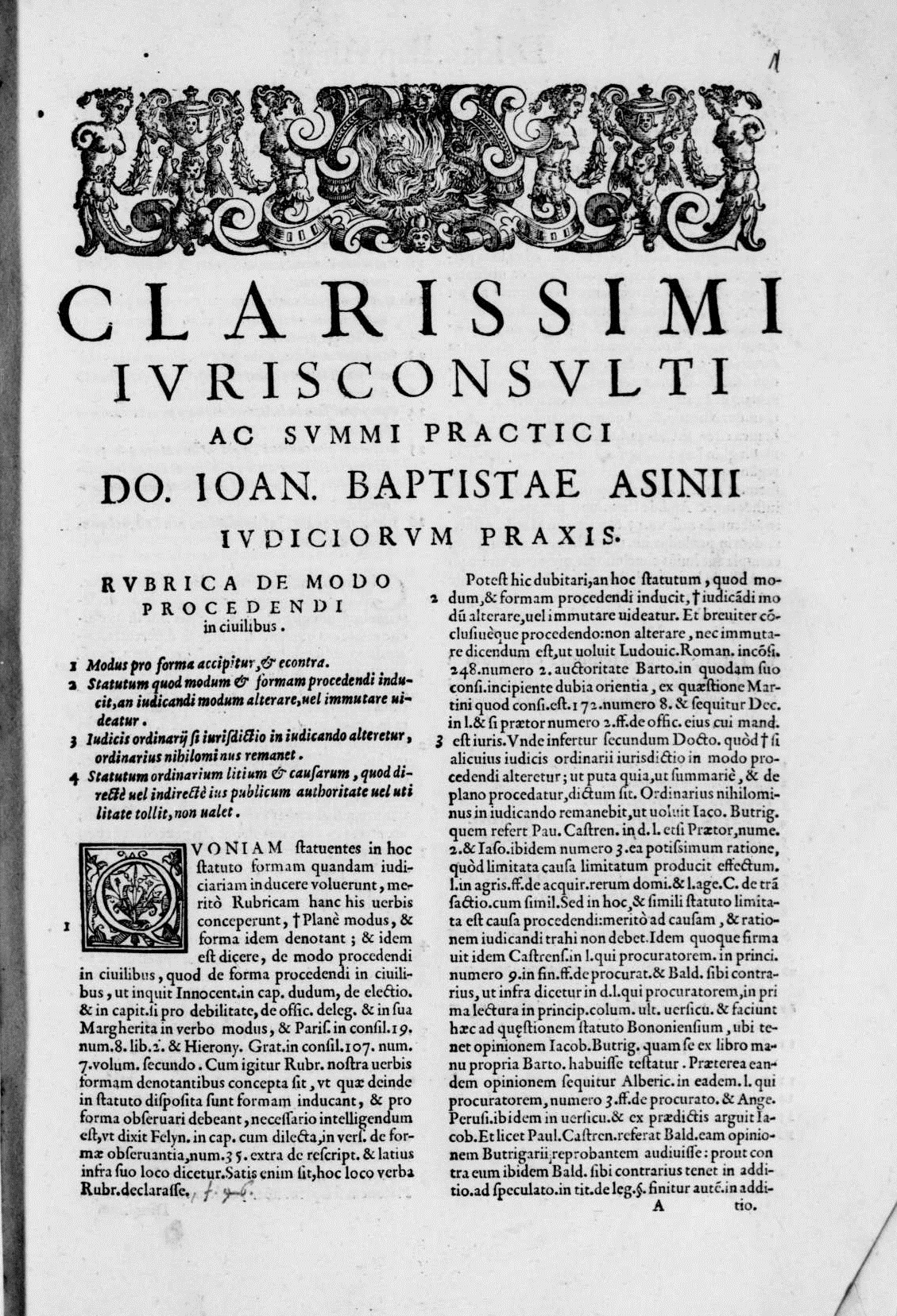 Carta A1r